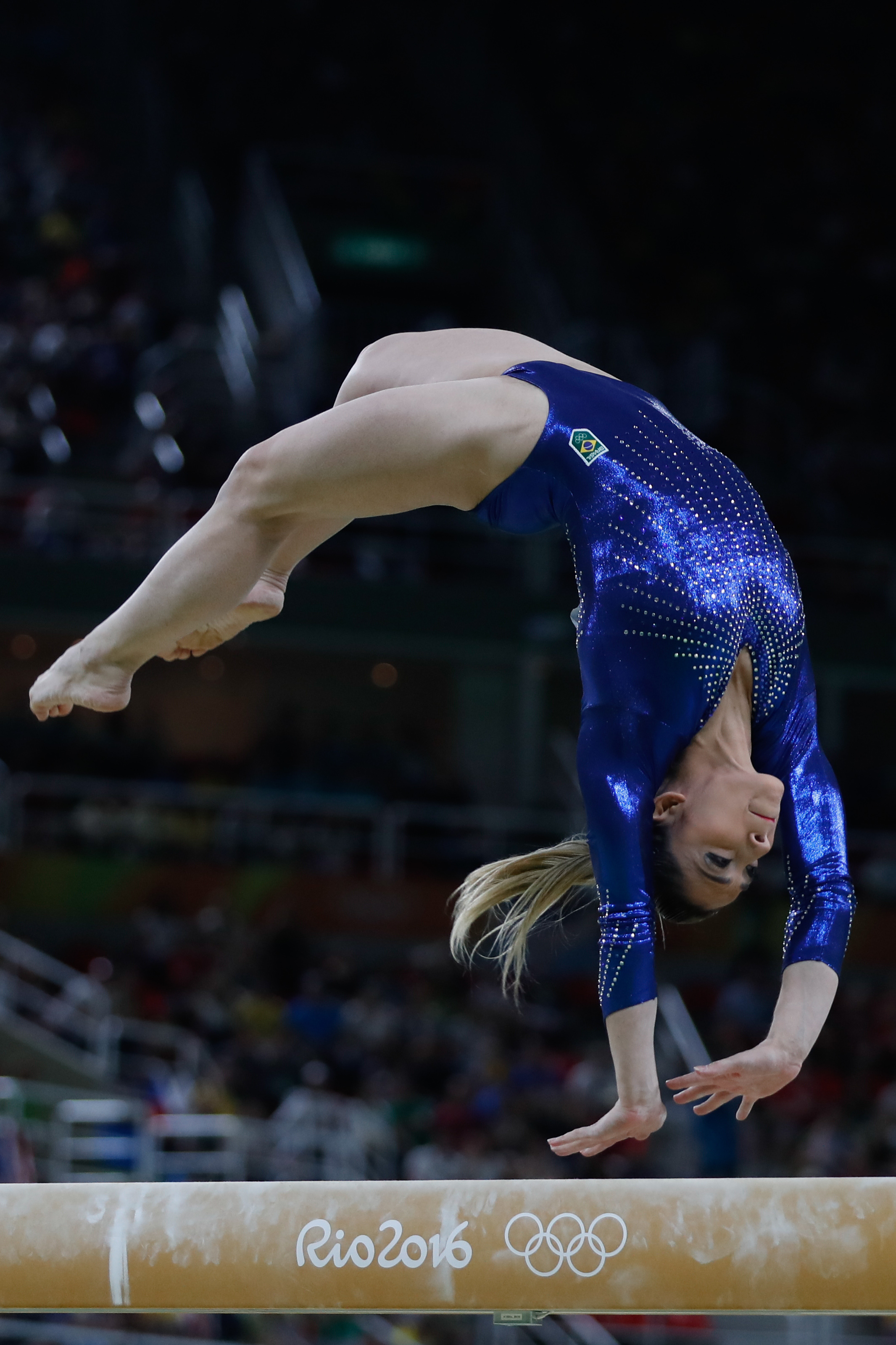 Rio de Janeiro - Danieler Hypolito durante final por equipes da ginástica artística feminina nos Jogos Olímpicos Rio 2016, em que o Brasil terminou em 8º lugar. (Fernando Frazão/Agência Brasil)